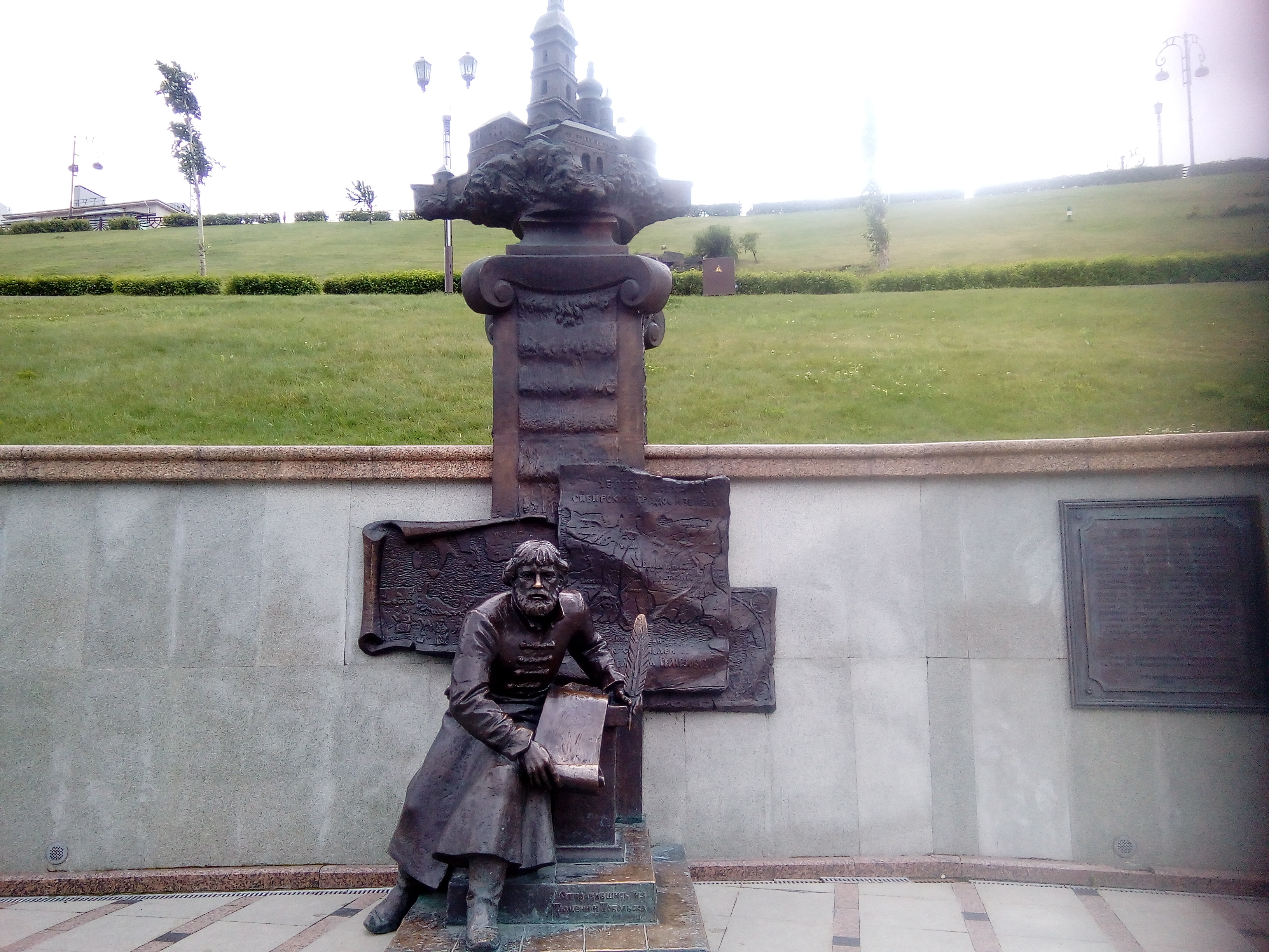 Мой фотоснимок скульптуры «Сибирские картографы», которая расположена на набережной Тюмени. Созданная в 2010 году коллективом скульпторов из Екатеринбурга. На ней изображён великий русский географ и картограф Семён Ульянович Ремезов и главный труд его жизни — «Чертёжная книга Сибири».